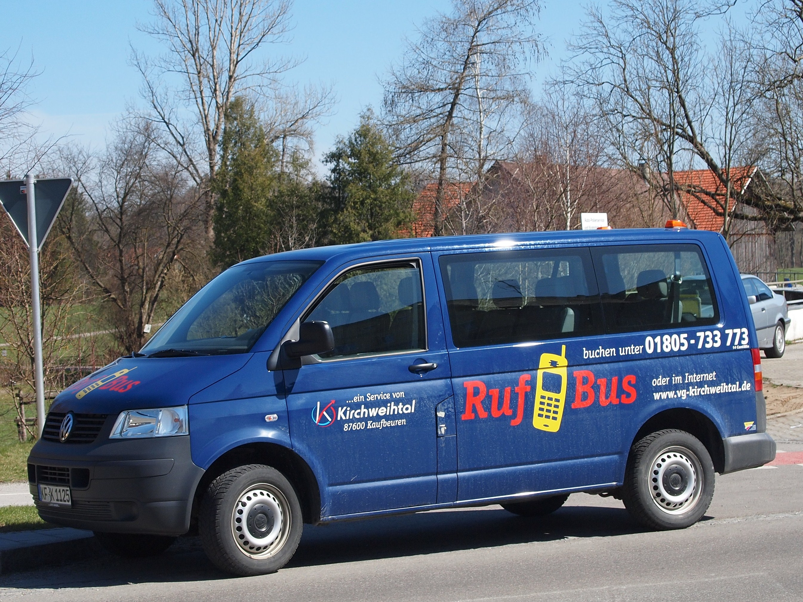 Rufbus-Fahrzeug der Verkehrsgesellschaft Kirchweihtal GmbH, Kaufbeuren